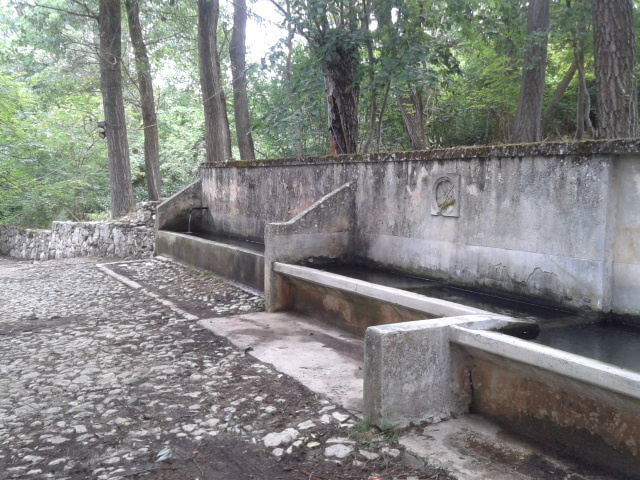 Fonte di Sale tra Carrito e Castiglione